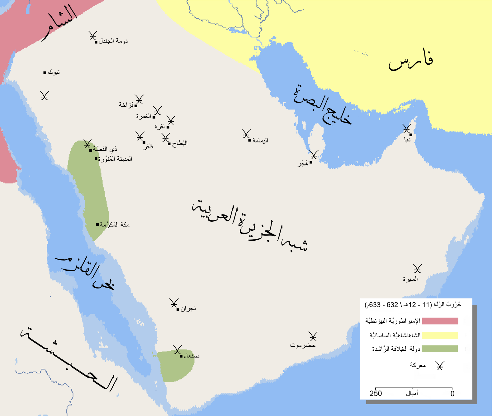 خارطة تُظهرُ أبرز المعارك التي وقعت أثناء حُرُوب الرَّدة بين المُسلمين والقبائل العربيَّة المُرتدَّة عن الإسلام ومعهم مُدعي النُبوَّة. للاطلاع على خرائط أصليَّة تُظهرُ مسار الجيوش، انظر: هُنا وهُنا.